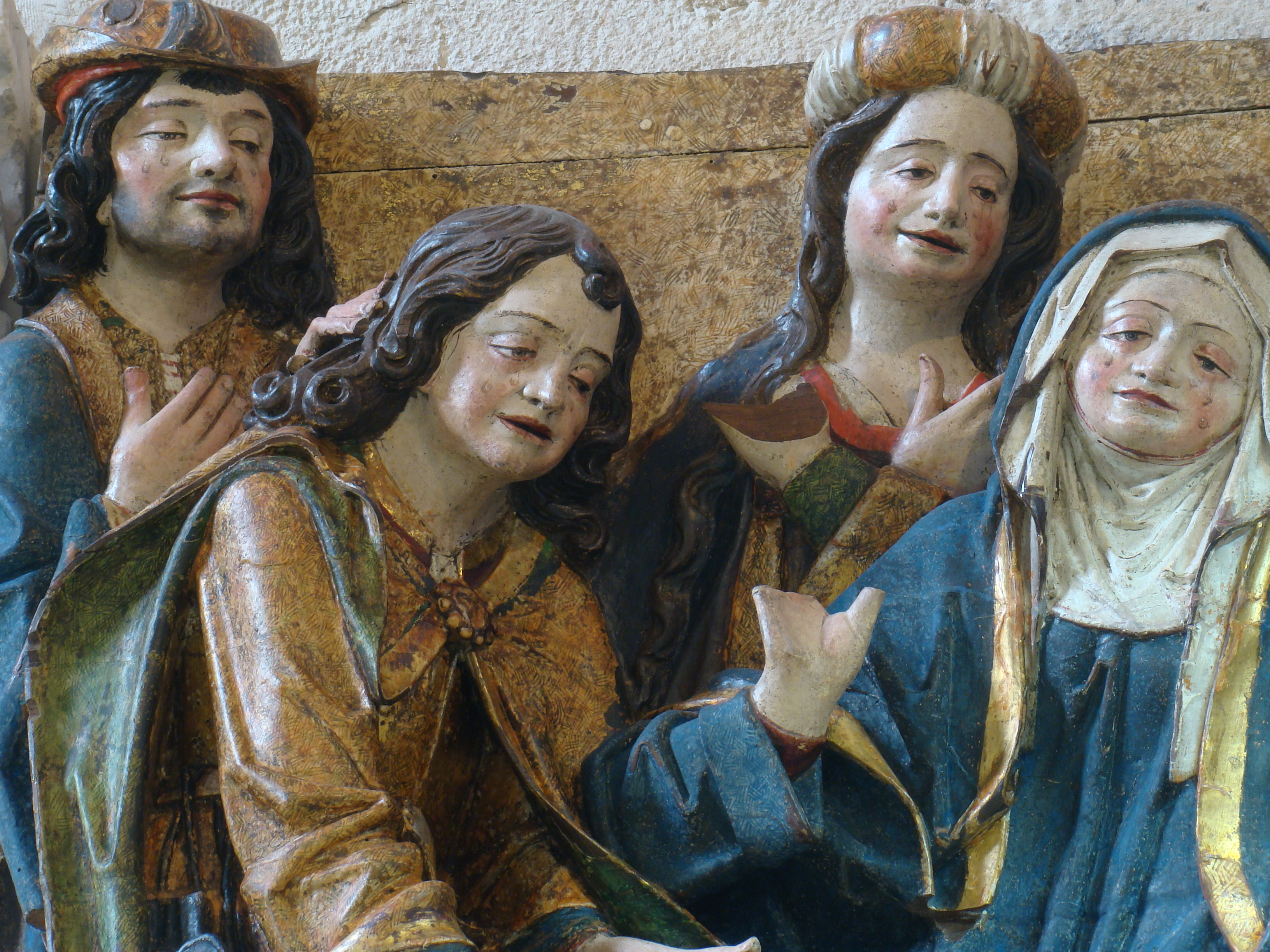 Llanto sobre Cristo muerto del escultor Alejo de Vahía. Procede de la parte central de la predela de un retablo de la iglesia de Bolaños de Campos, provincia de Valladolid, España. Obra hispano-flamenca de hacia 1500.